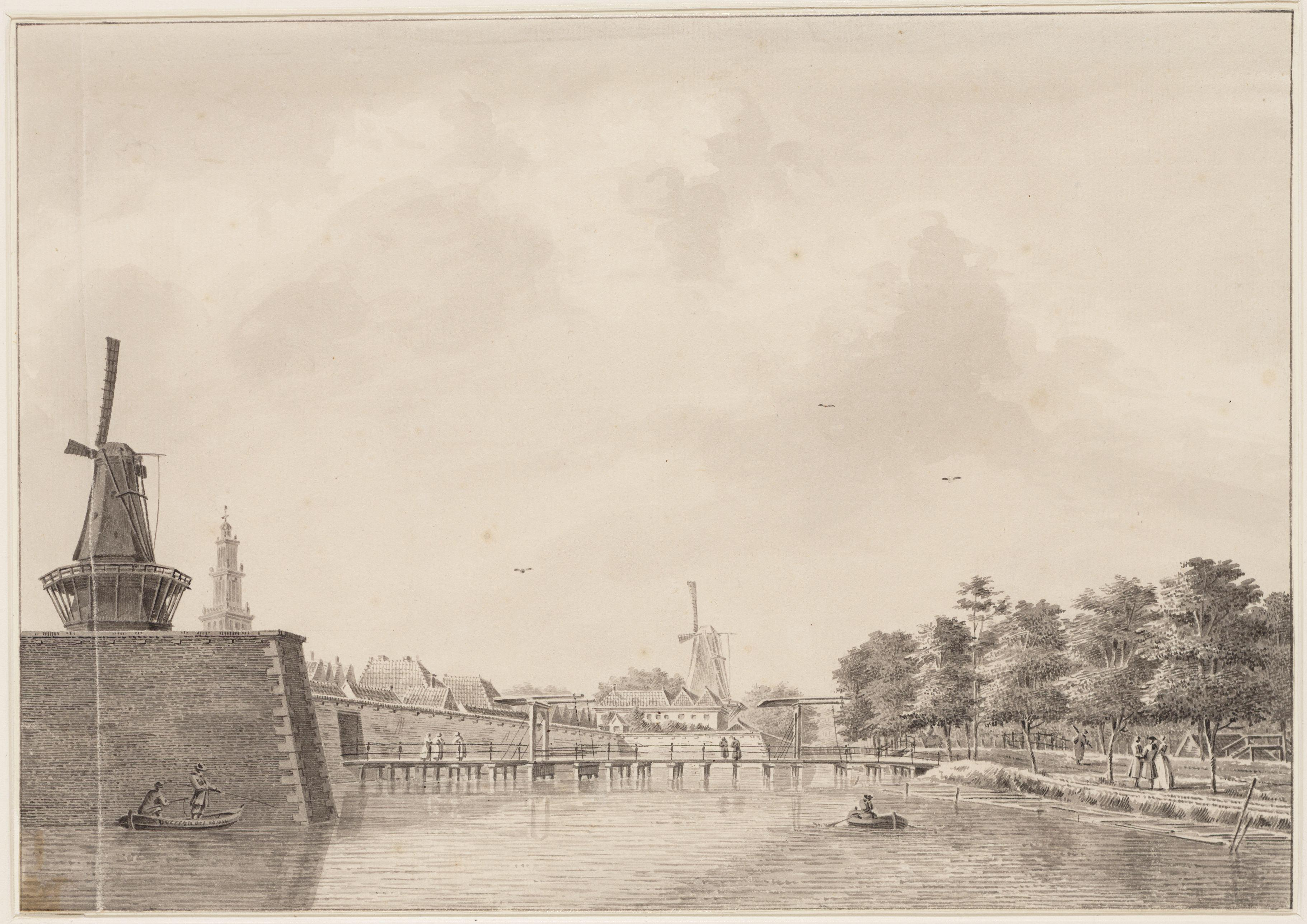 Gezicht naar het zuidwesten op de Zaagmolenpoort, met geheel links windmolen De Kat, met in het verschiet de Westertoren